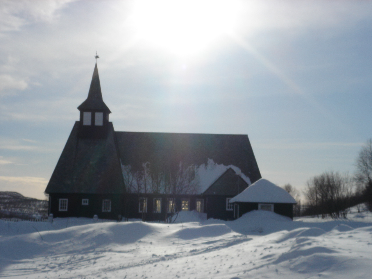 Masi kirke, Masi Church